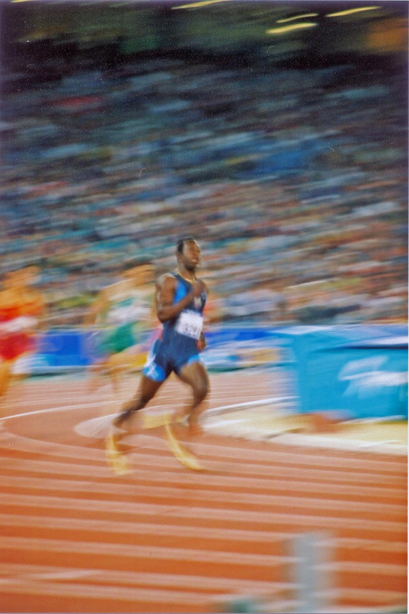 Michael Johnson- Olympic Games 2000 - Jeux Olympiques de Sydney 2000 Prise le 22 août 2004 mis en ligne le 4 juillet 2005